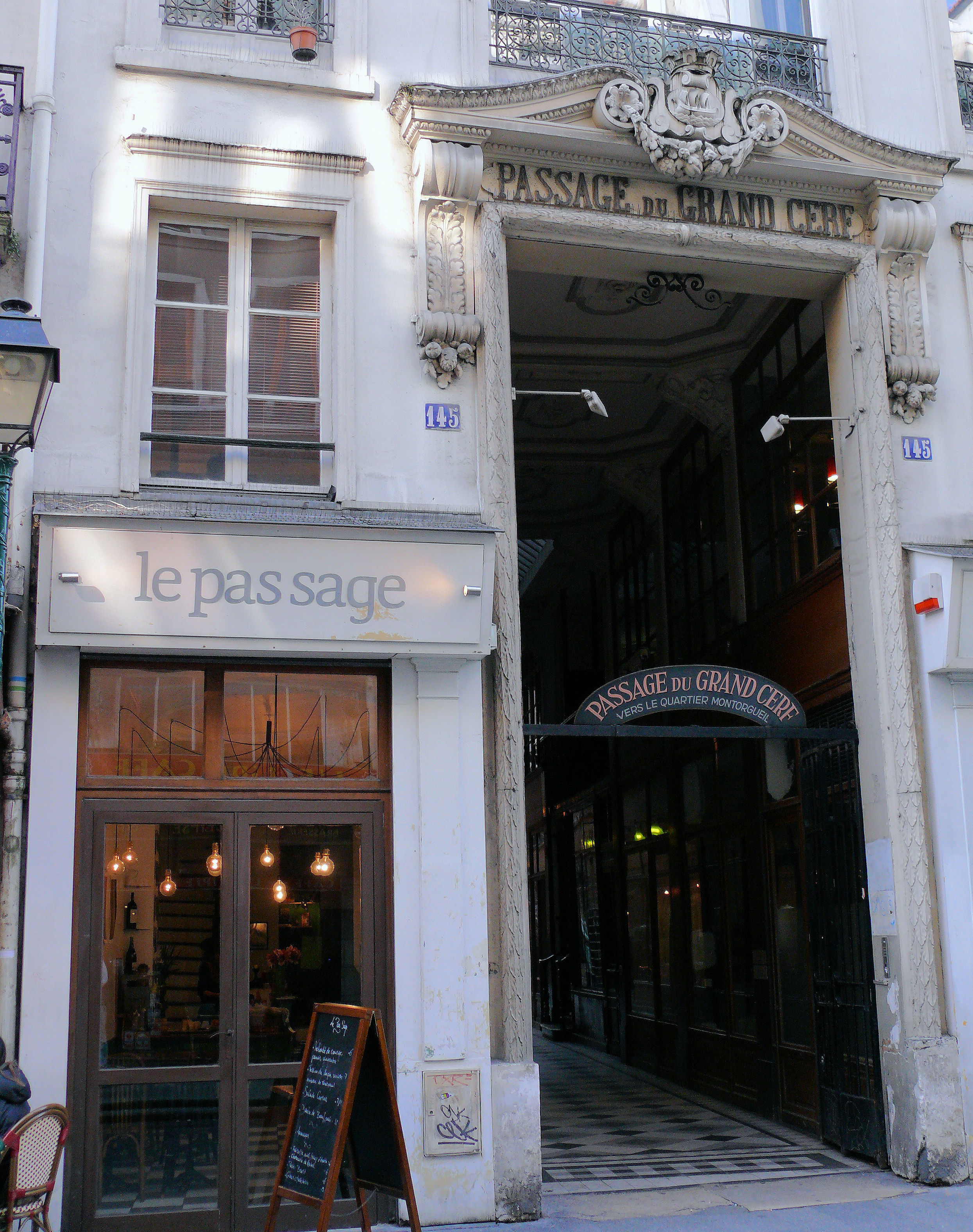 Paris 2e arrondissement - Passage du Grand-Cerf